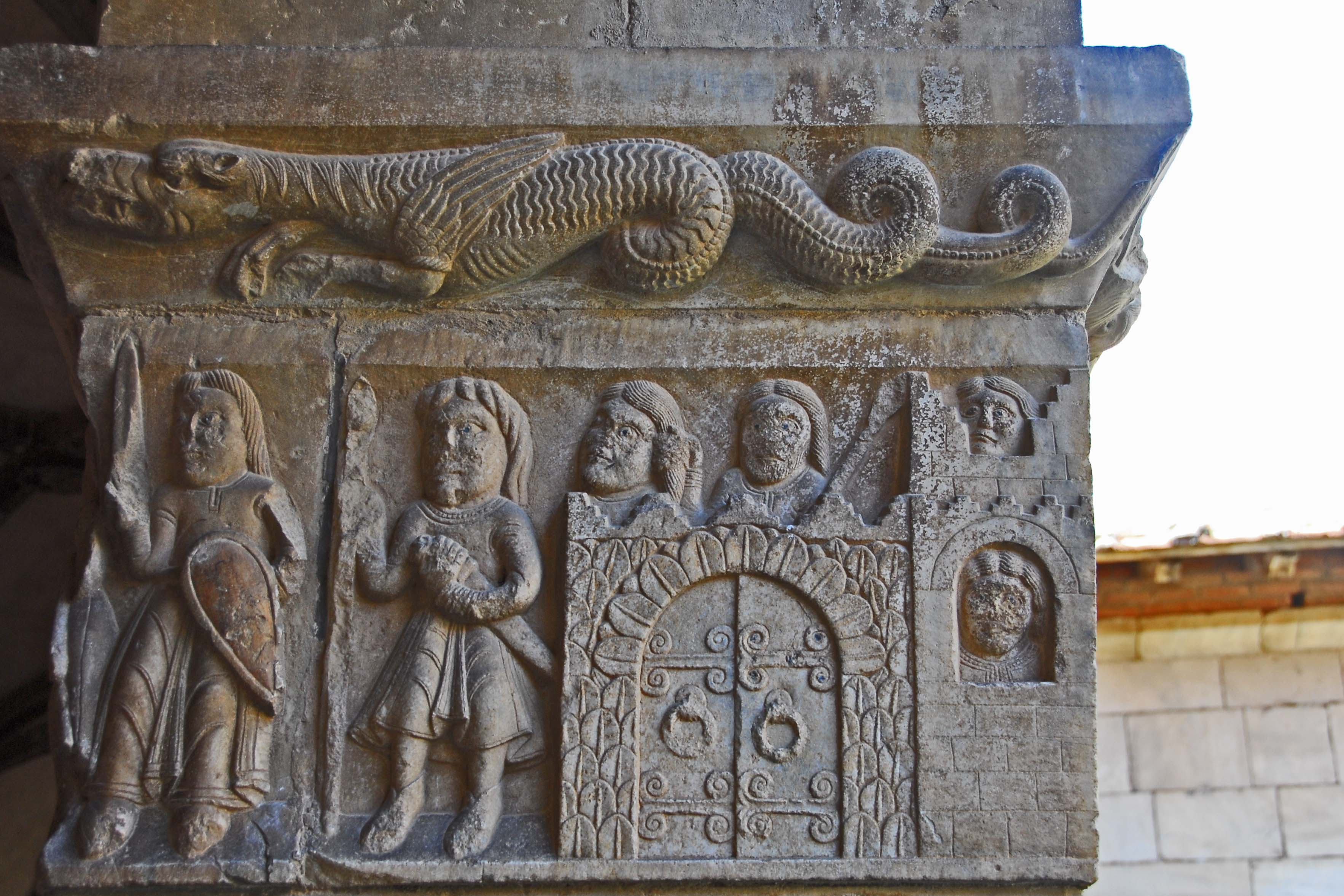 Ste-Eulalie-et-Ste-Julie_d’Elne, Pfeilerkapitell, Südgalerie, Saulus vor Damaskus